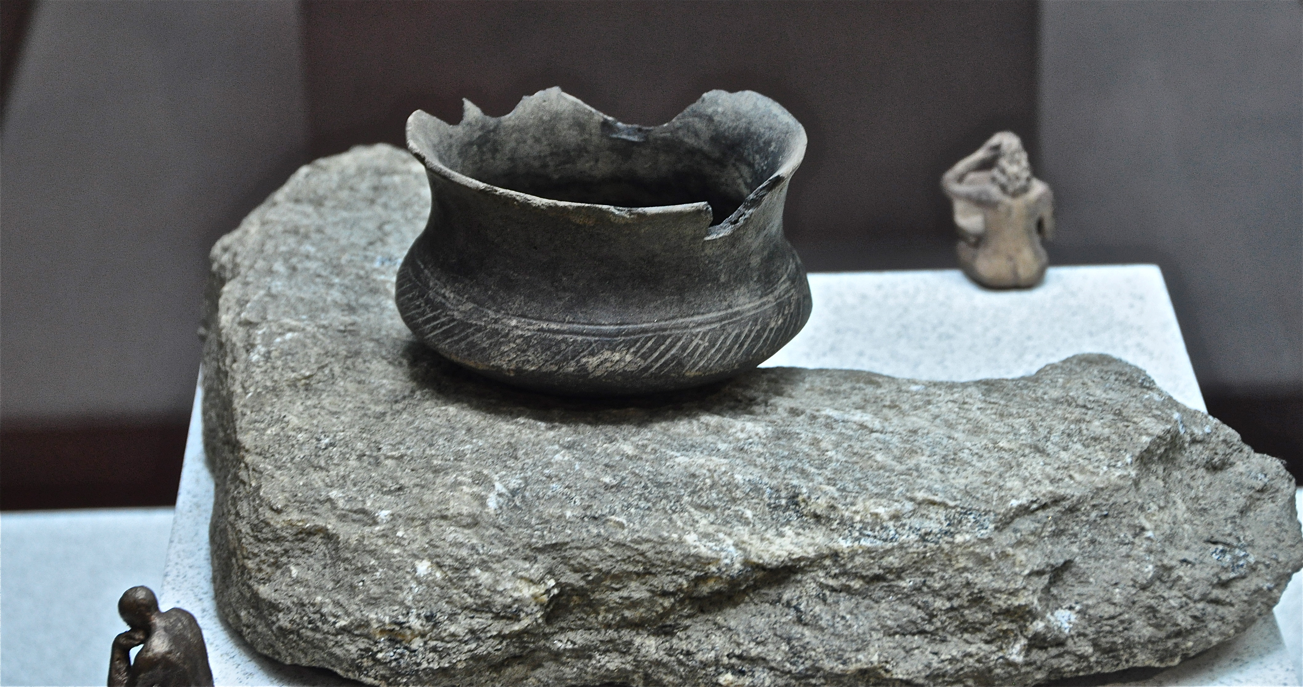 Età del Bronzo Recente ( XIII sec. a.C.) Lastra di fondo con cuppella al centro, vasetto biconico-lenticolare.